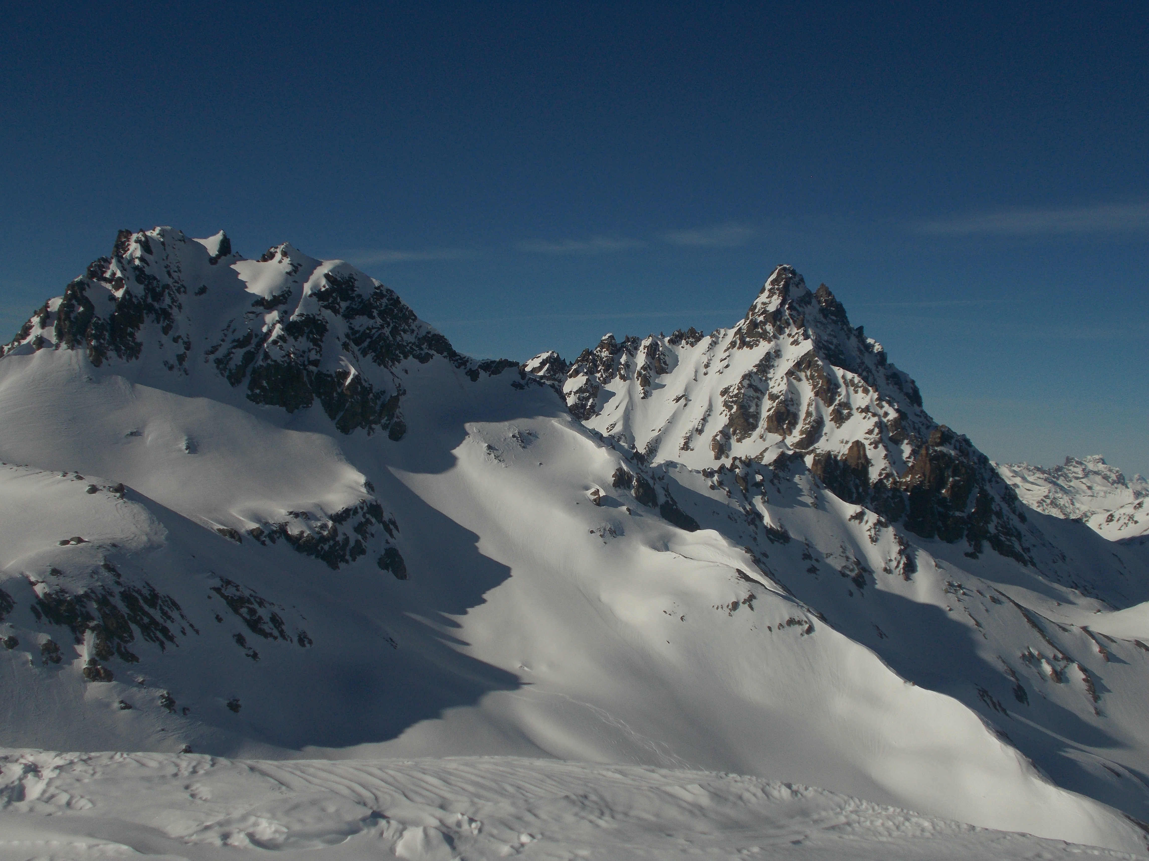 Die Krone (3187 m, das Pseudo-Fluchthorn) vorn und das Fluchthorn (hinten) im Winter von Südosten. Die Weilenmannrinne zieht vom Sattel links des dunklen Gipfelaufbaues nach links unten.